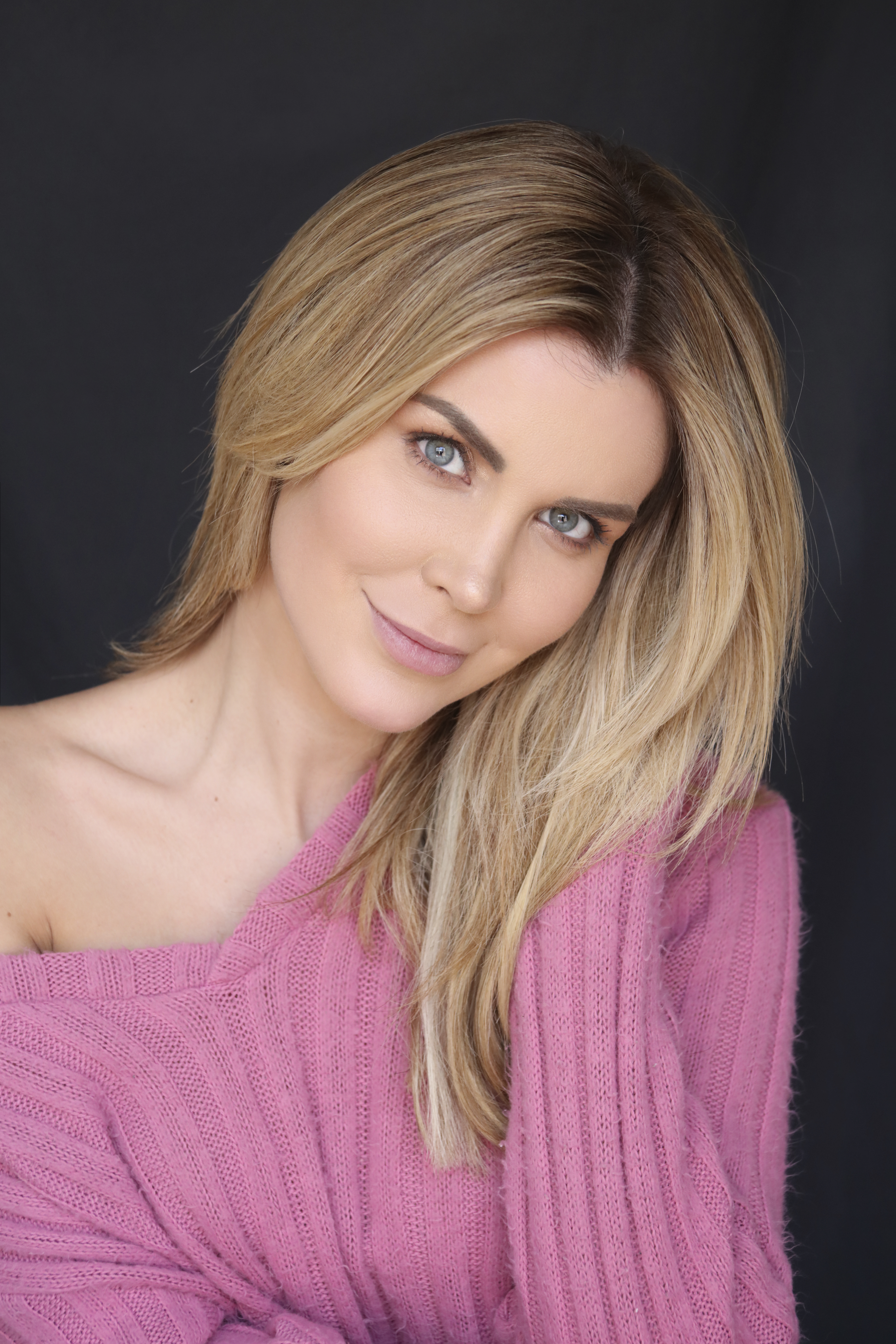 ACTRESS